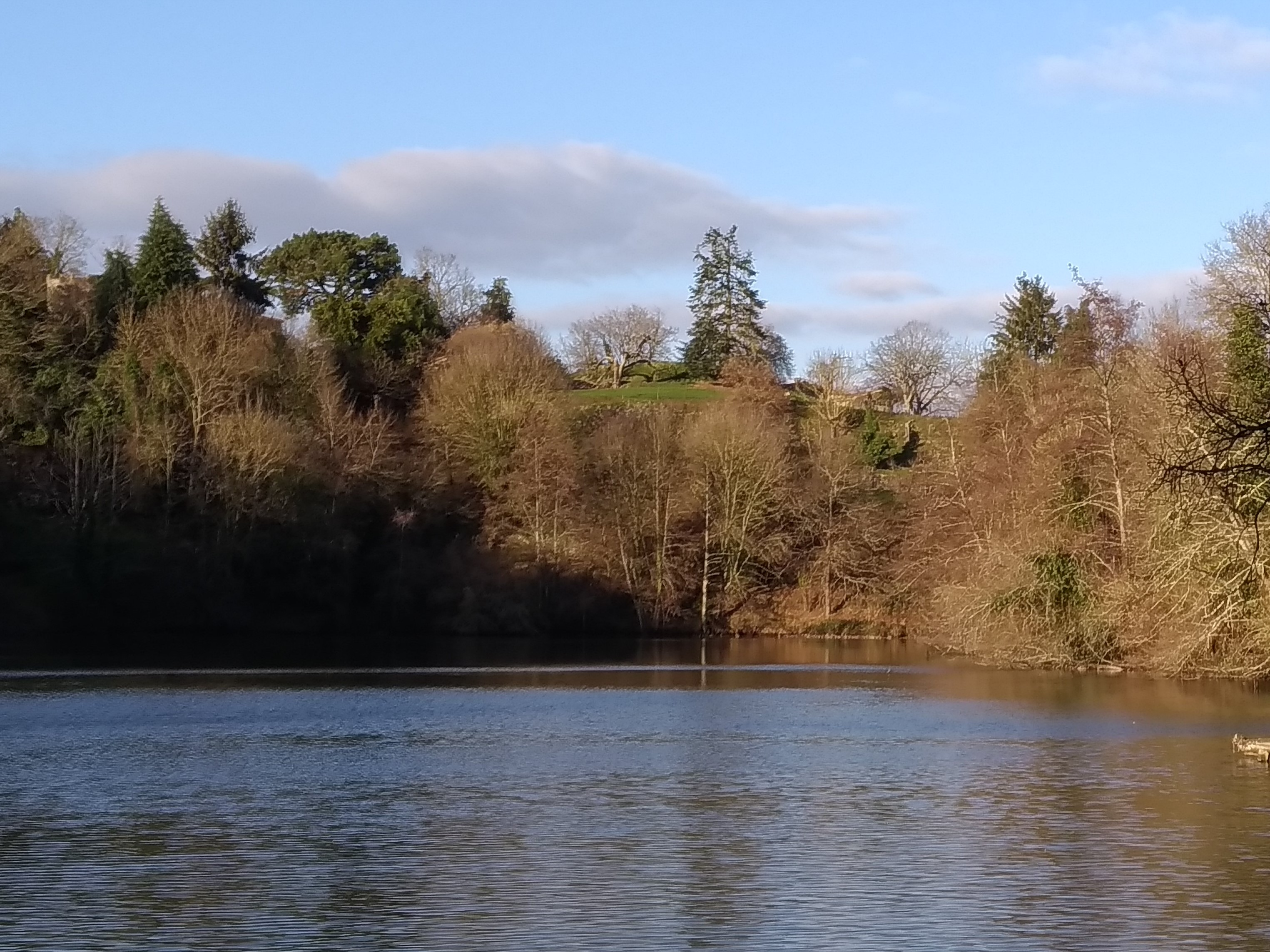 Vue sur la motte castrale du Château-Neuf localisée au nord-ouest de l'ancien château-fort de Vouvant. Photographie prise depuis les berges de la Mère du côté ouest du Petit-Château.